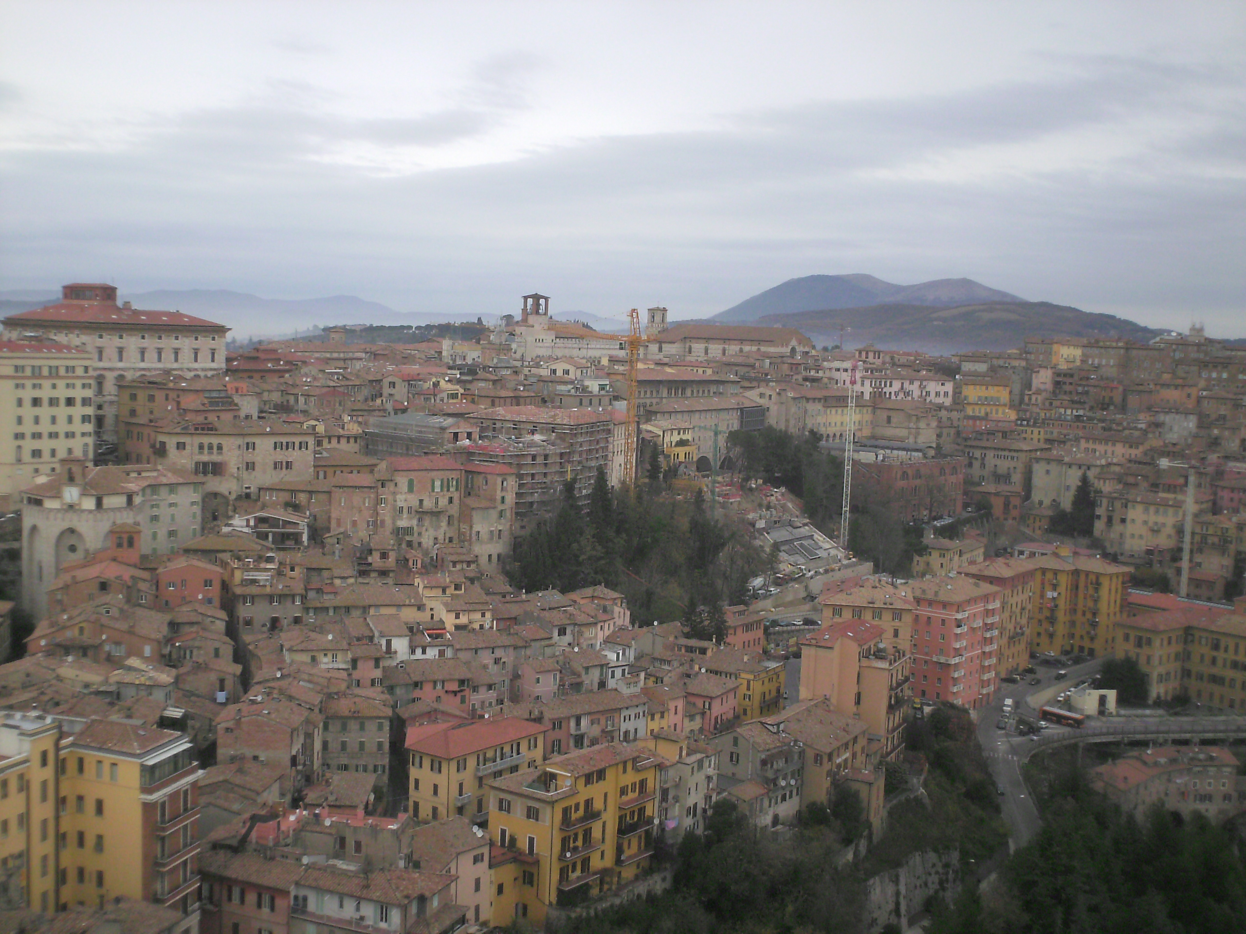 Vista sul centro storico di Perugia sud-ovest.